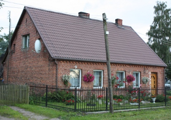 Żarnowska - wieś w gminie Wicko